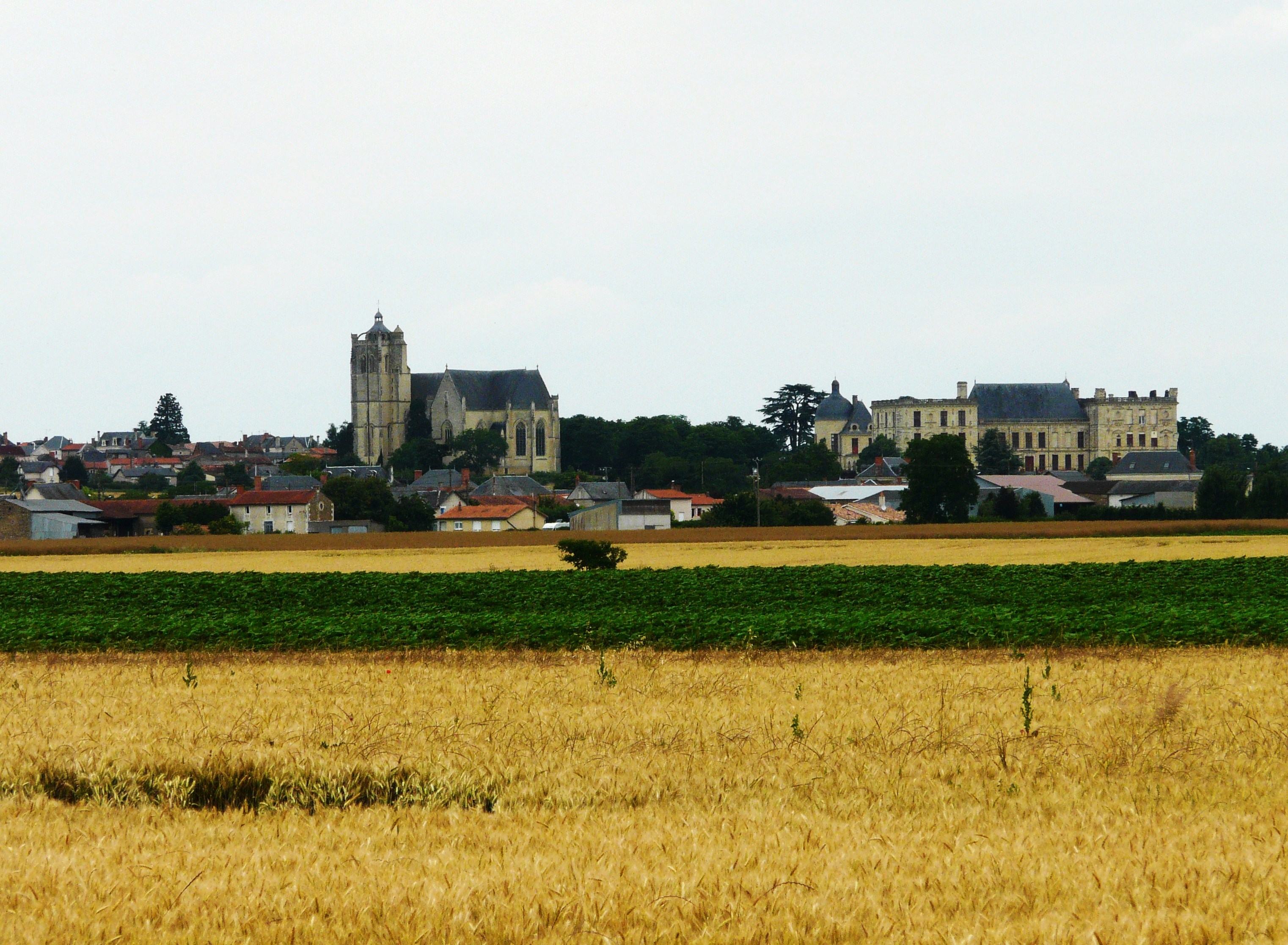 Le bourg d'Oiron avec son château et sa collégiale